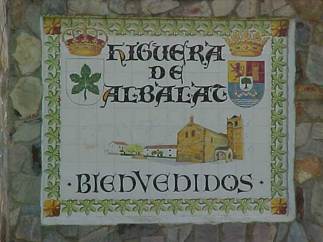 Cartel en la localidad de Higuera, en Cáceres (España)